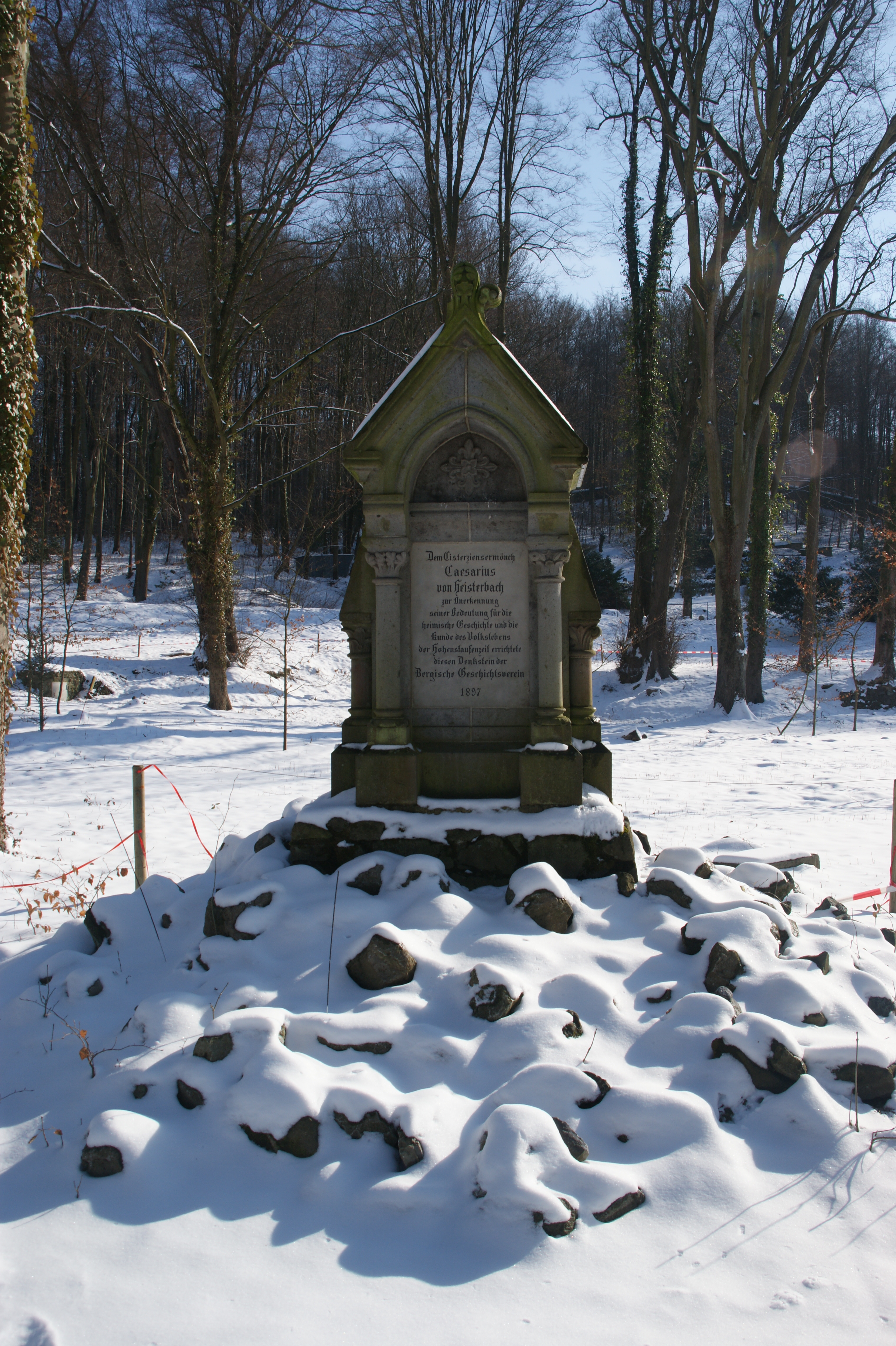 Gedenkstein für Caesarius Heisterbach neben der Chorruine Abtei Heisterbach, Königswinter; Gesteinsart Stenzelberger Latit.